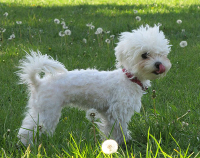 Maltezsky psik